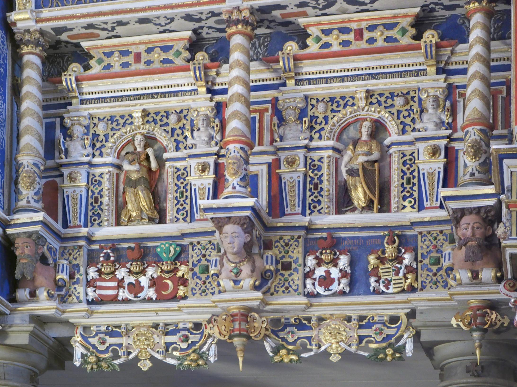 Mecklenburg-Vorpommern, Basedow, Kirche, Detail an der Orgel, Foto: September 2015